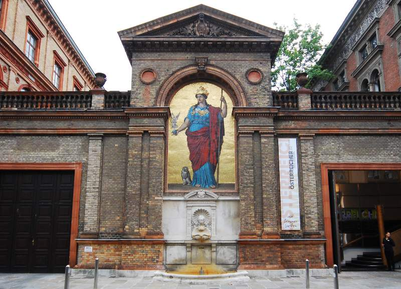 Der Minervabrunnen ist ein am Stubenring im 1. Wiener Gemeindebezirk Innere Stadt gelegener Wandbrunnen.